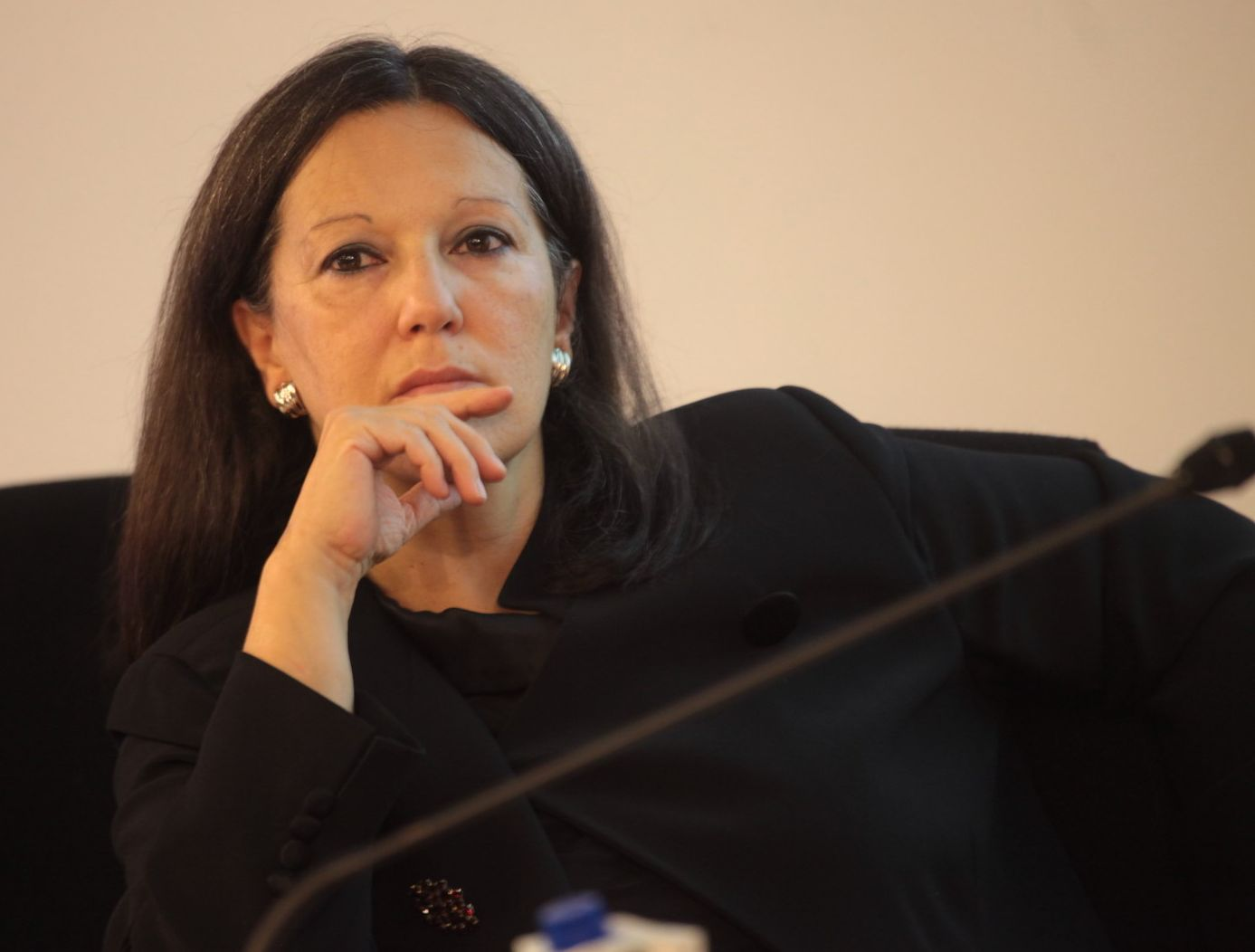 Catia Bastioli al Convegno Raffinerie chimiche verso Bioraffinerie